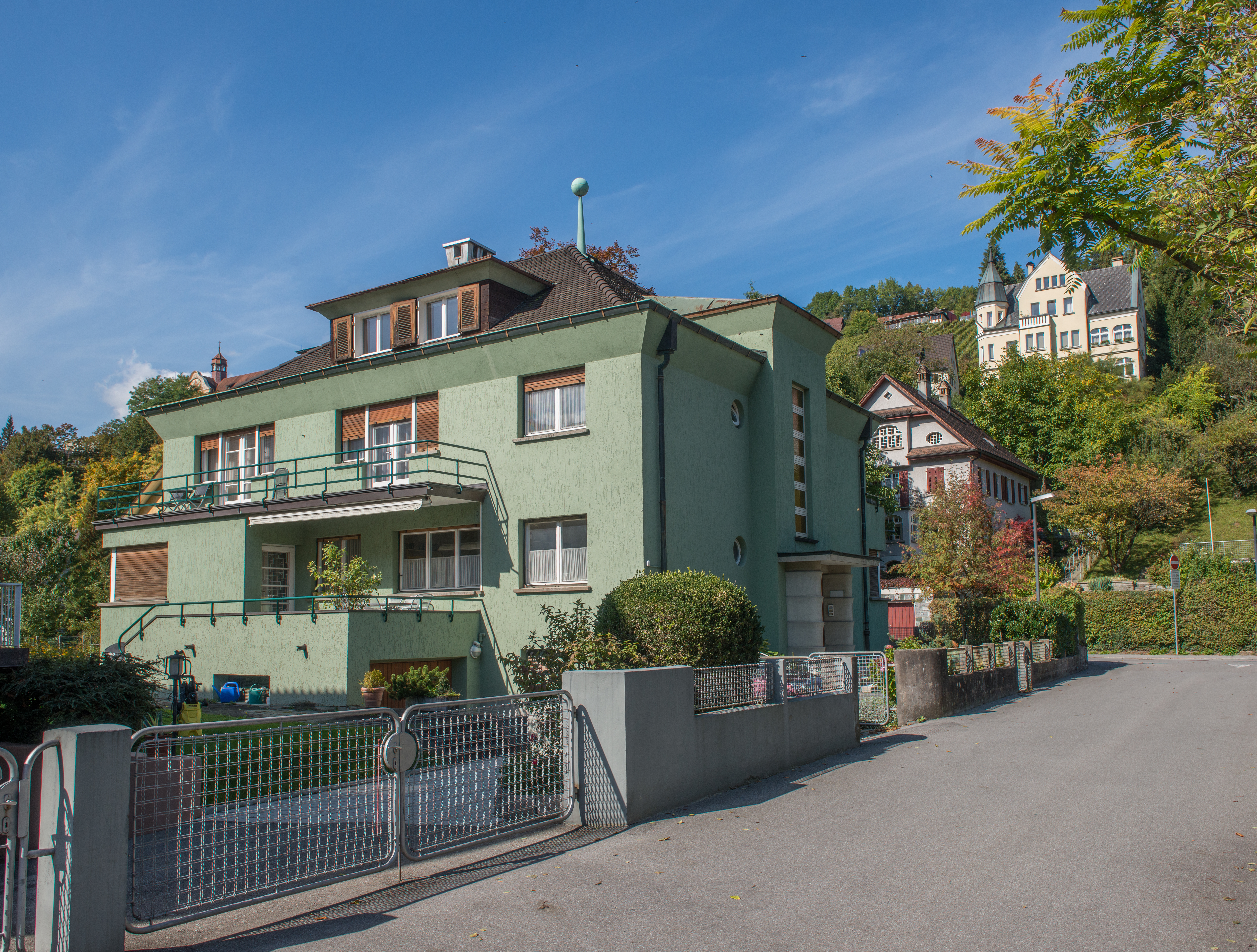 Villa Metzler, Fidelisstraße Nr.6 in Feldkirch. Erbaut 1935 von Klaus Ströbele.